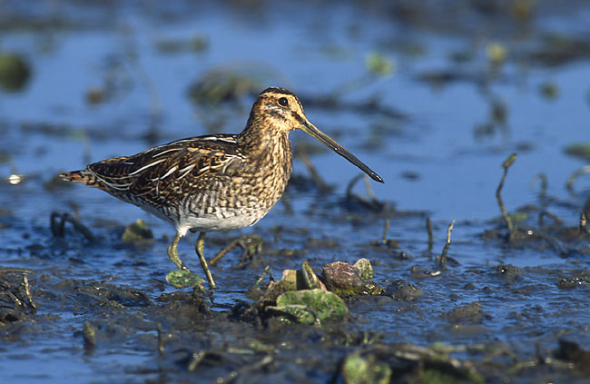 Gallinago gallinago